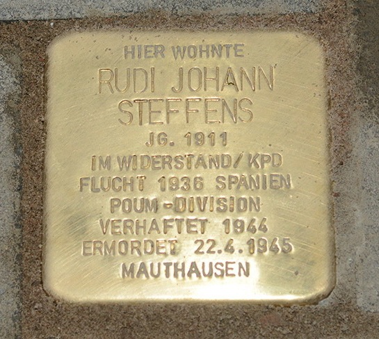 Stolperstein für Rudi Steffens, Michaelstr. 5, 48599 Gronau/Westf.